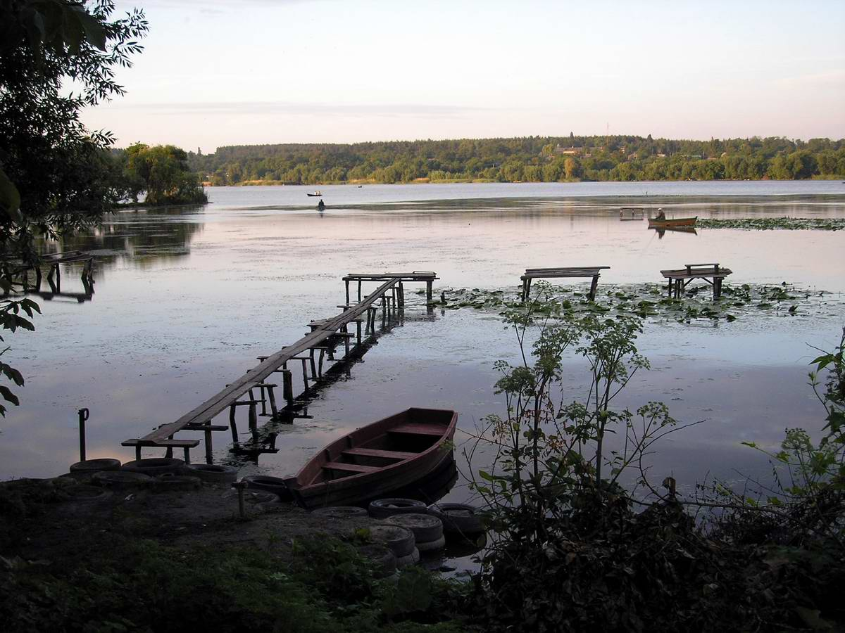 Гайворон, вид на річку Південний Буг